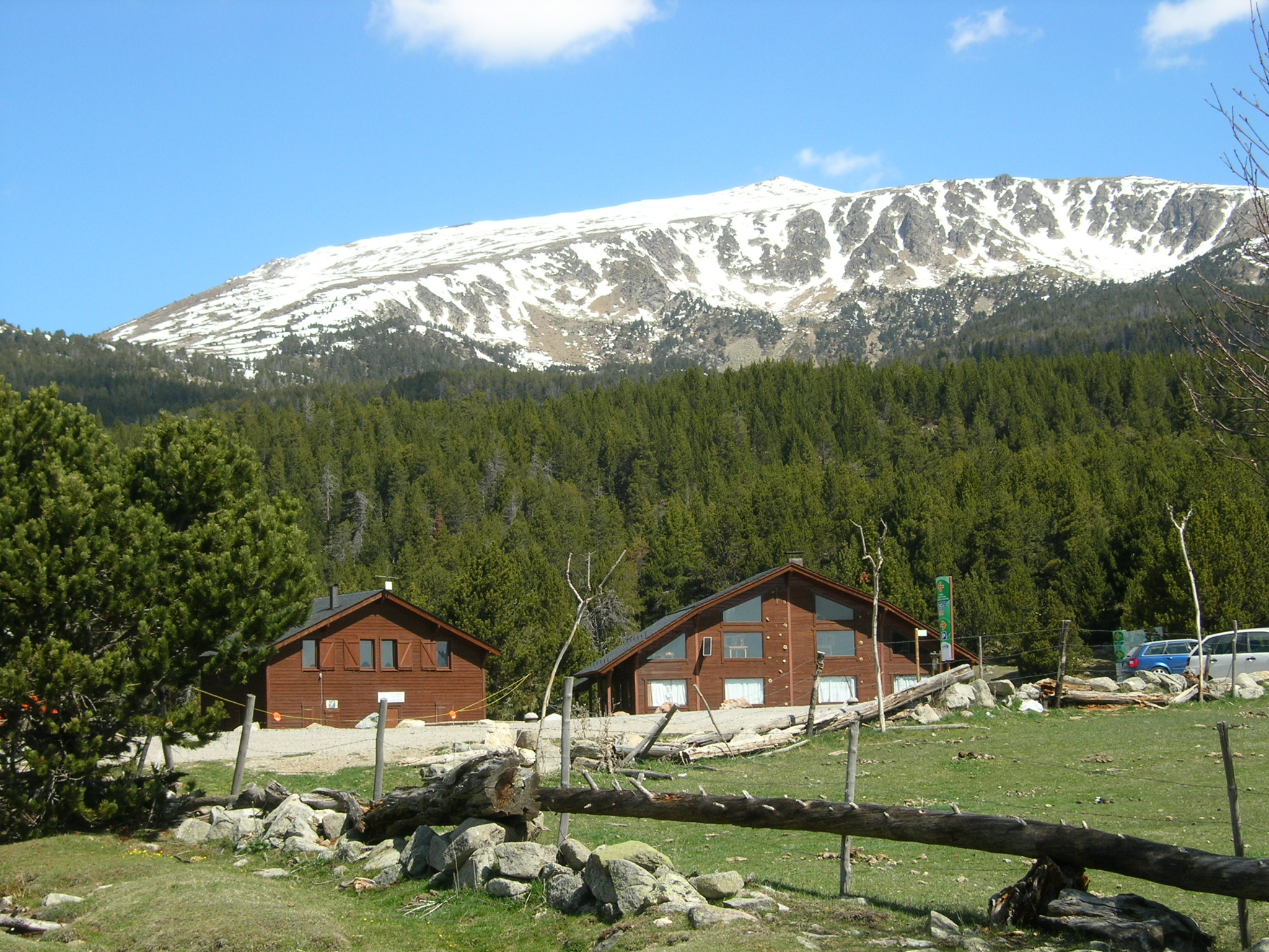 Tossa Plana de Lles-Puigpedrós This is a a photo of a natural area in Catalonia, Spain, with id: ES510205